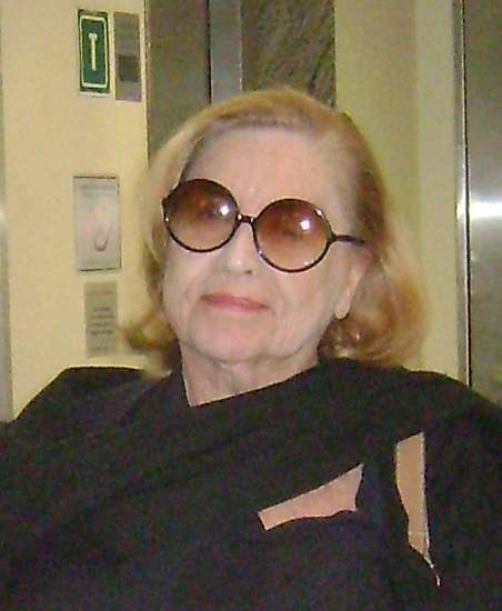 Jacqueline Laurence, atriz francesa, naturalizada brasileira, após a apresentação da peça "A Escola do Escândalo", em São Paulo.